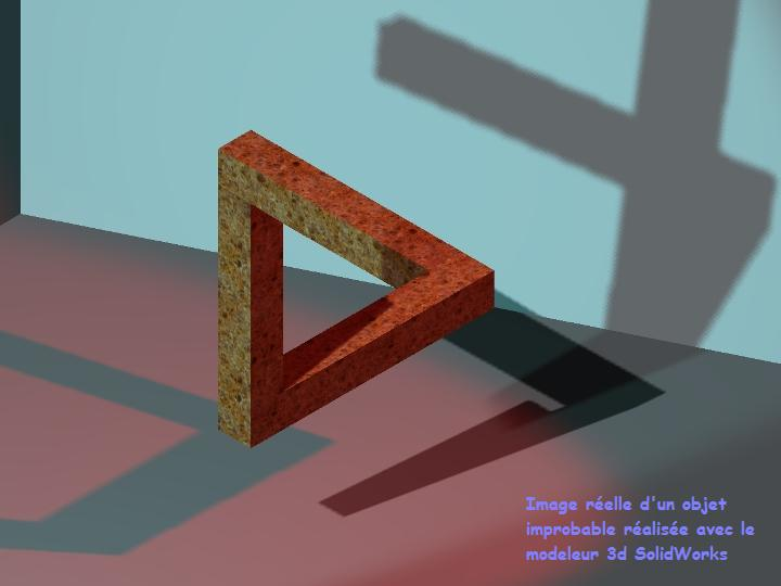 D'après le travail de MCE. Les ombres sont là pour trahir la réalité de l'objet qu'on regarde mais qui n'est pas celui que l'on voit (croit voir). En y regardant de plus près, ce rendu laisse entrevoir la supercherie: une arrête est visible au sommet de la "colonne" où elle semble se raccorder avec la poutre horizontale en réalité bien plus bas et plus au fond. Modélisation sous Solidworks . Texture Photoworks. Le modèle 3D est paramètré afin de retrouver automatiquement l'angle de vue critique quelles que soient les dimensions de l'objet.